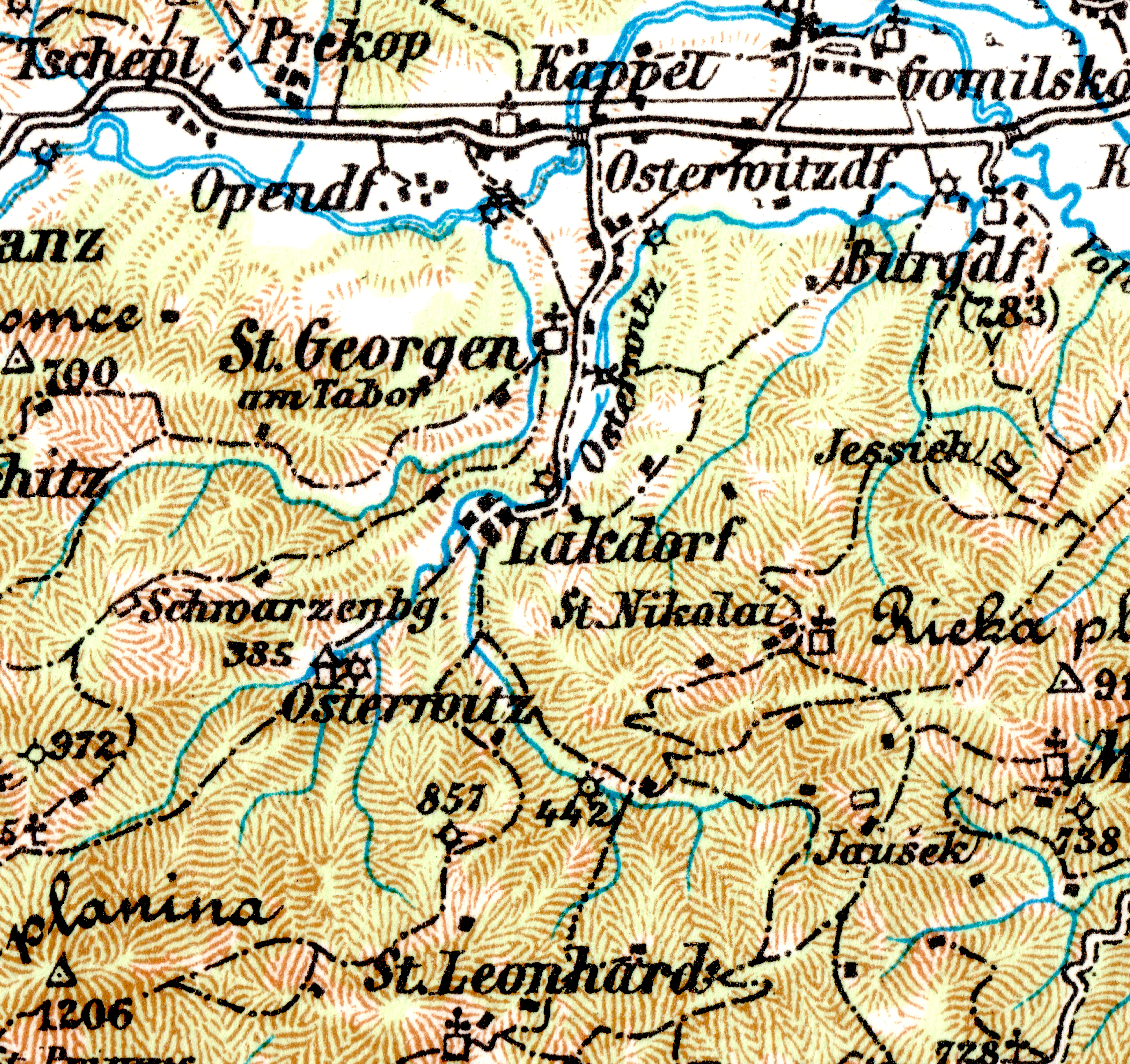 Lage von Burg, Gebiet und Fluß von Ojstrica (damals: Osterwitz) im Südwesten des Beckens von Cilli im 19. Jahrhundert. Ausschnitt aus dem Blatt 33° 46° Cille (Celje) der franzisko-josephinischen (3.) Landesaufnahme, Kartengrundlage Spezialkarte 1:75.000 Stand 1894